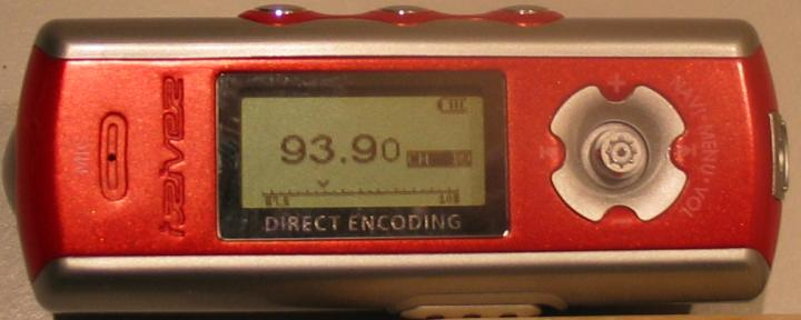 Mp3-afspiller. IRiver. 2004